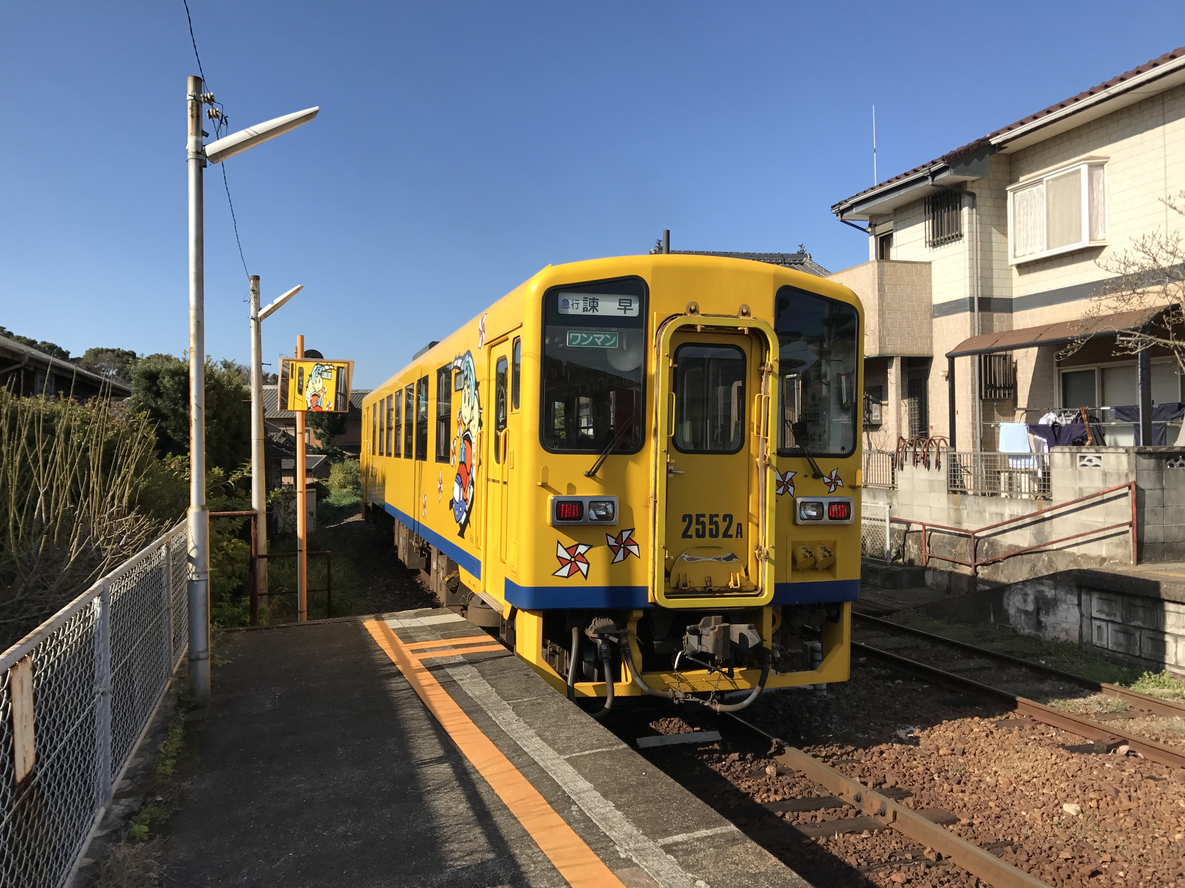 神代町駅を発車した島原鉄道の諫早行き急行列車